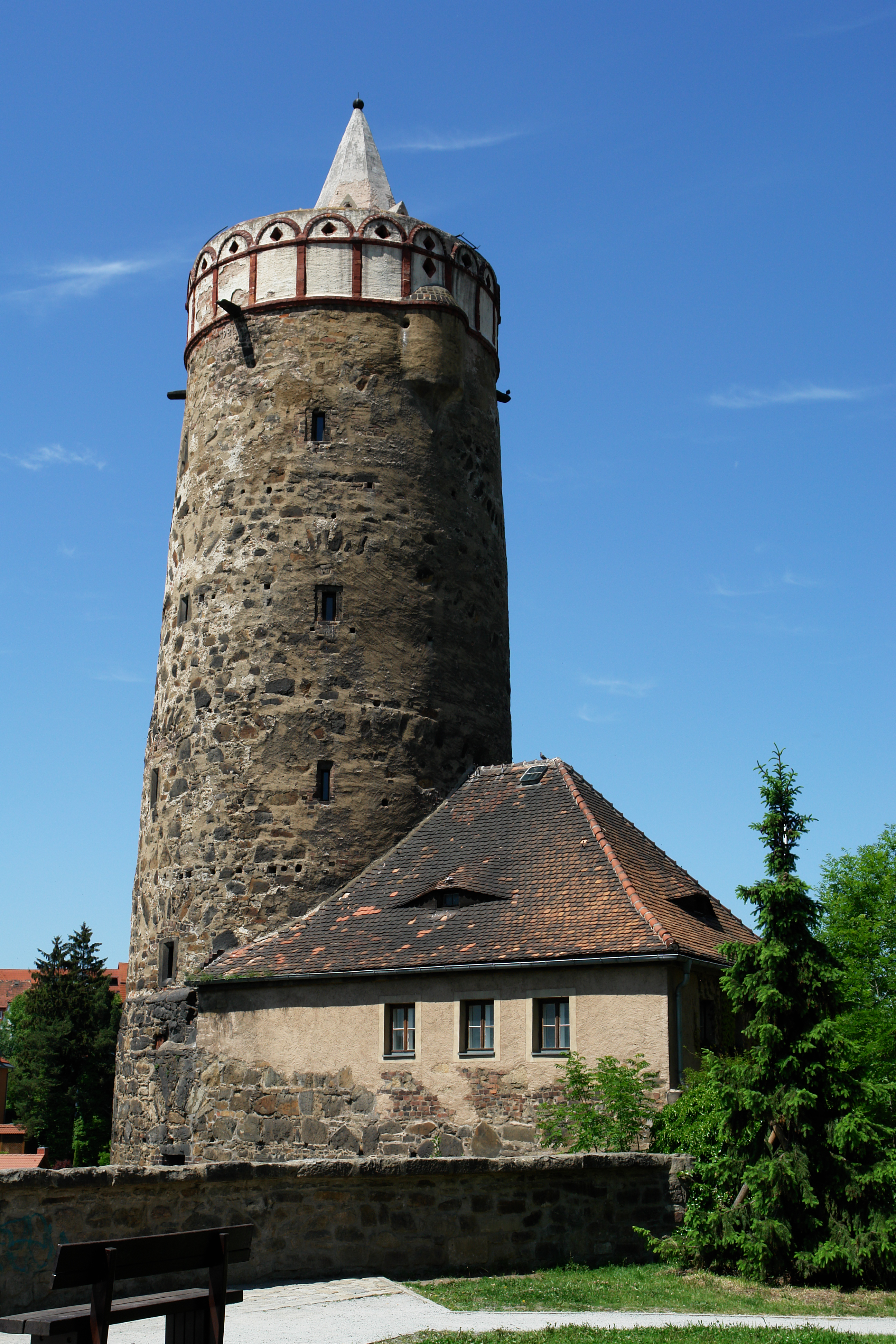 Alte Wasserkunst in Bautzen.